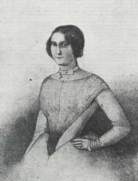 Portrait der deutschen Freischärlerin Mathilde Hitzfeld.